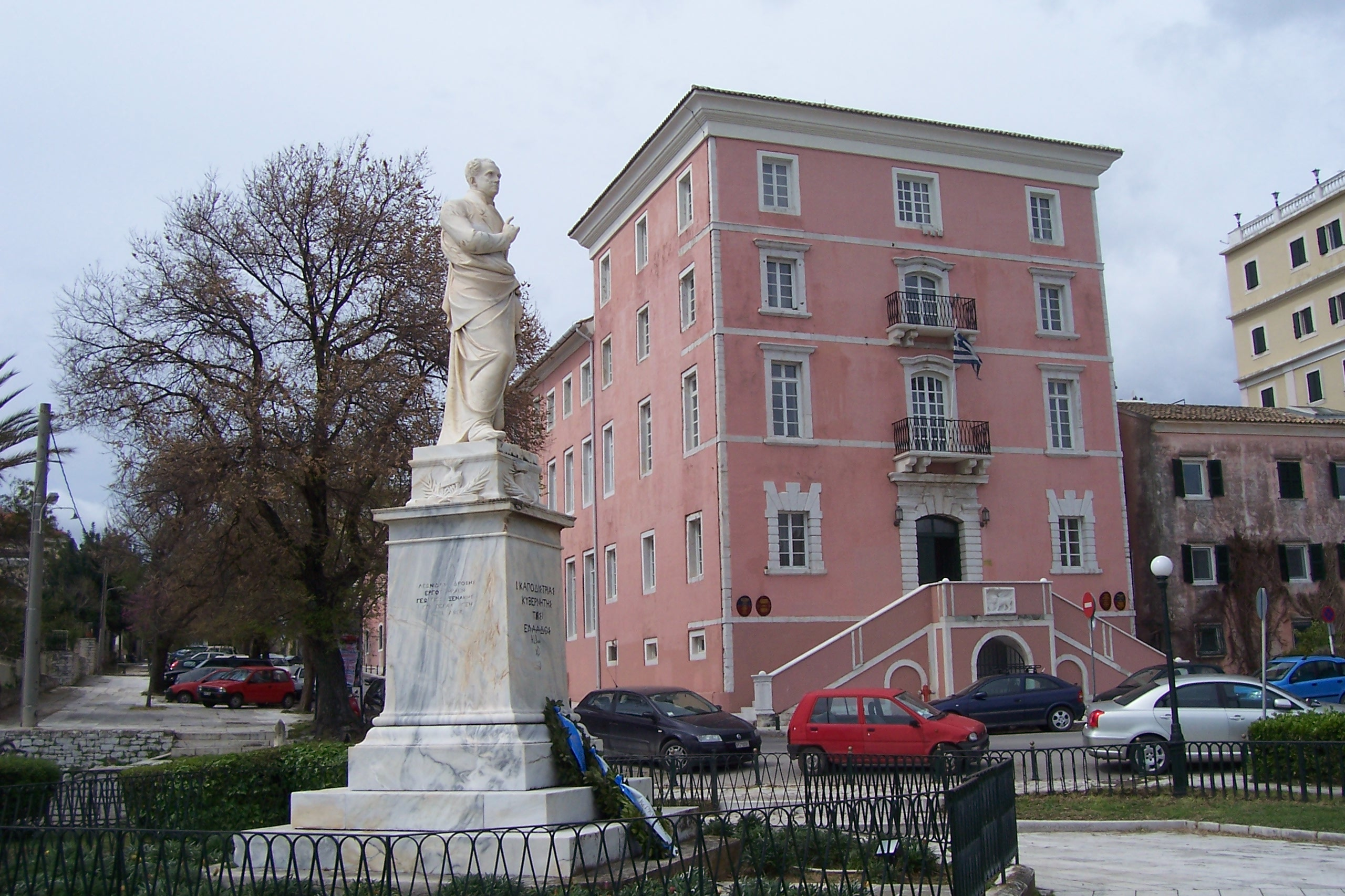 Ιόνιος Ακαδημία και άγαλμα του Καποδίστρια.